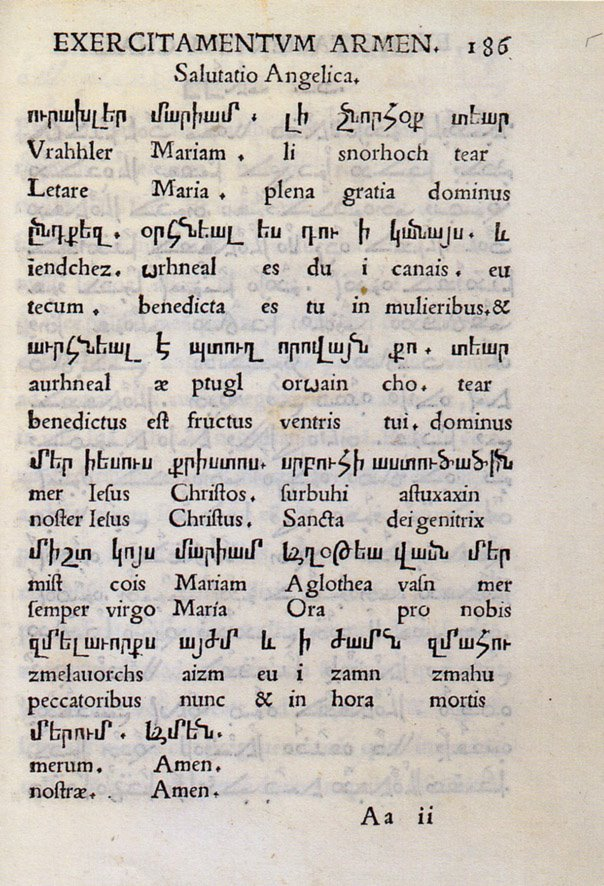 Страница из «Introductio In Chaldaicam Lingua, Syriac, atque Armenica» Тезео Албонеси